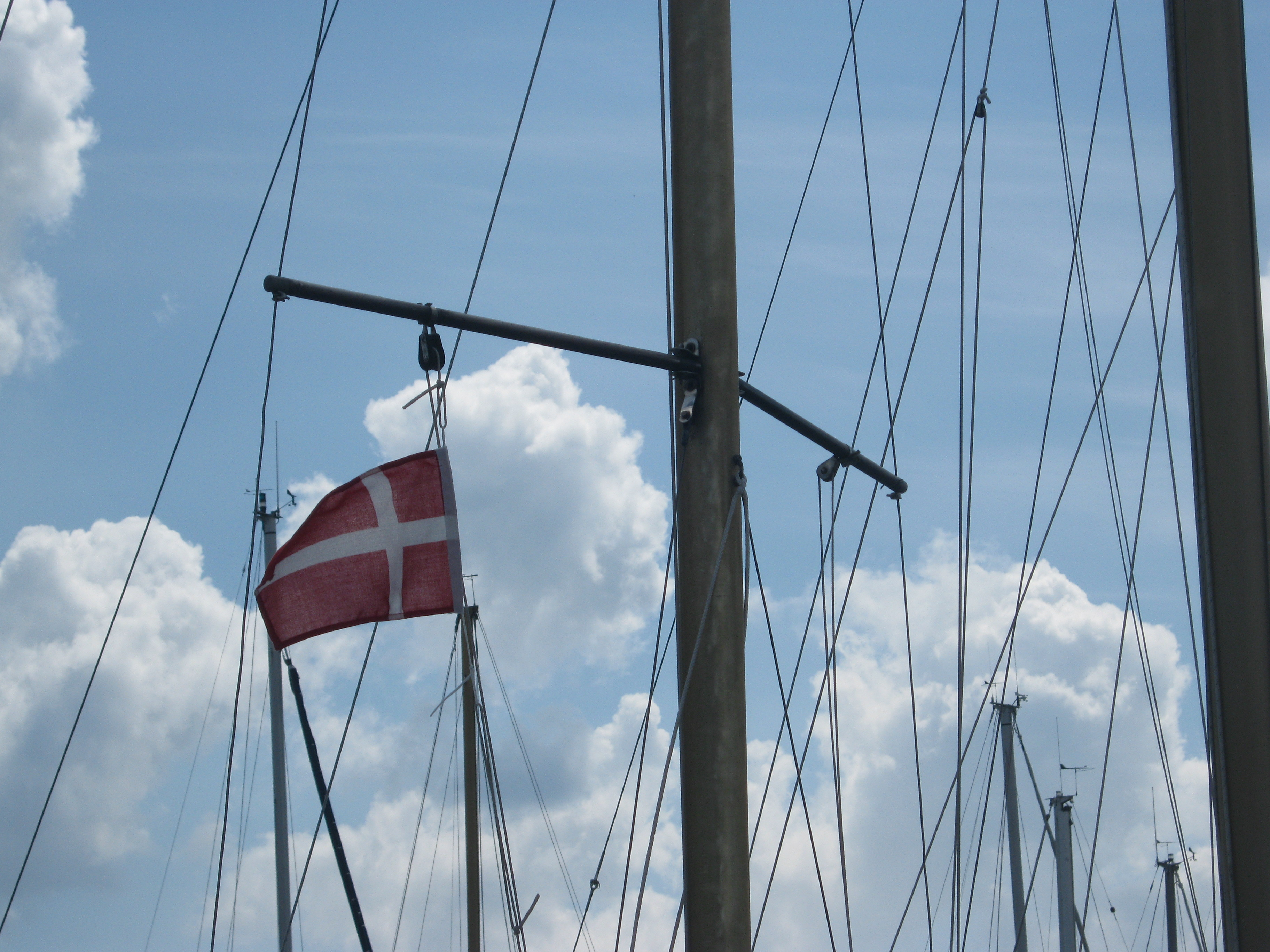 Gastlandsflagge